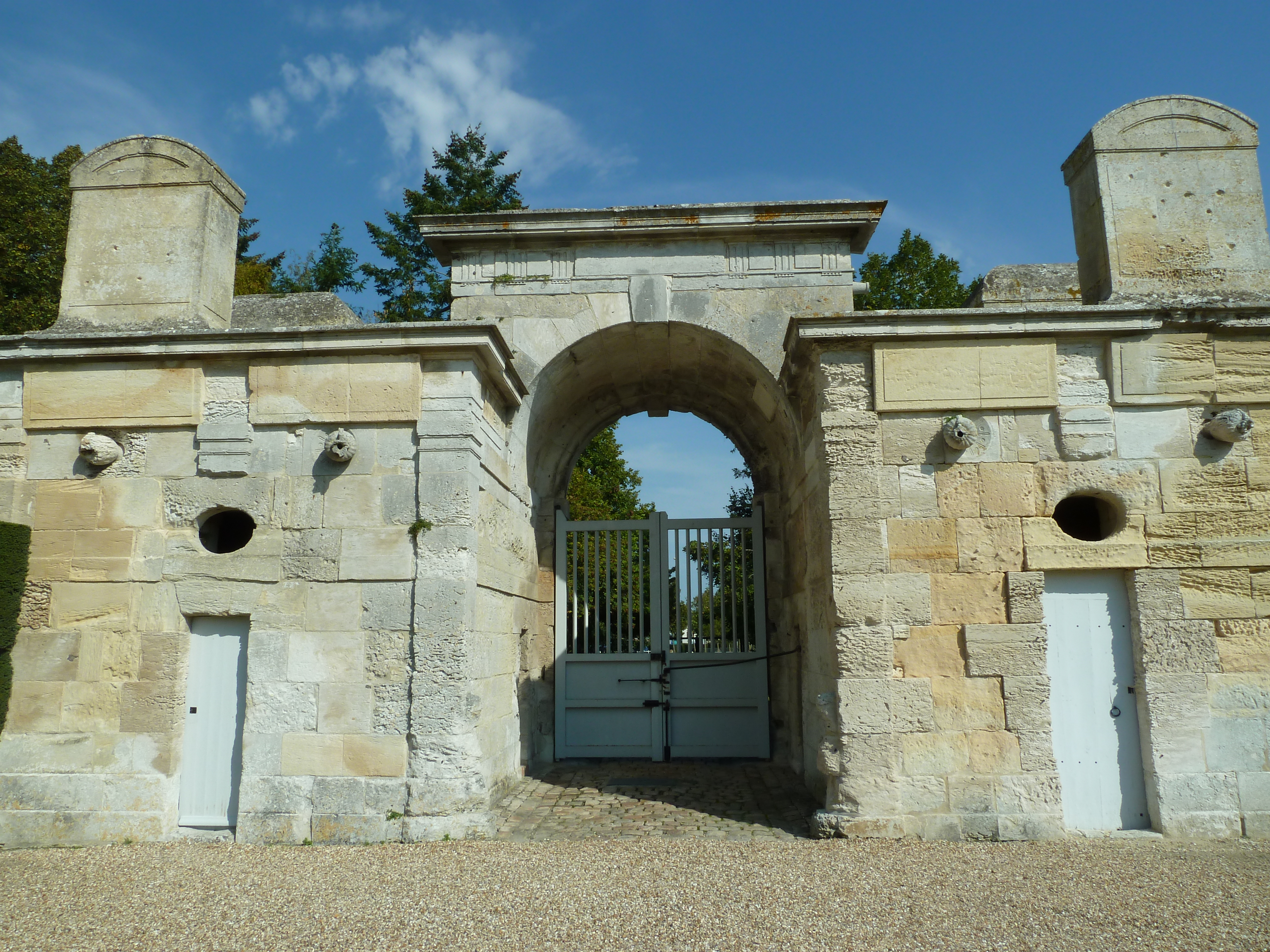 Château d'Anet - Anet - Eure-et-Loir - France - Mérimée PA00096955 .